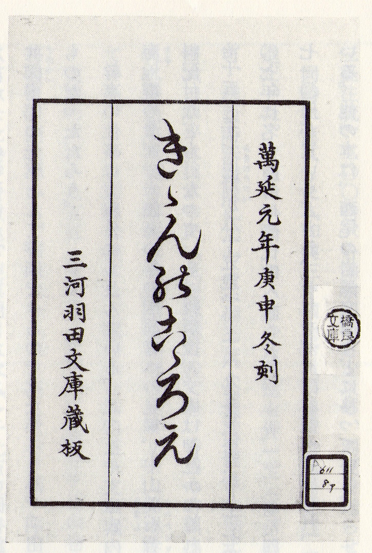 羽田八幡宮文庫『きゝんのこゝろえ』表紙（万延元年、1860年）